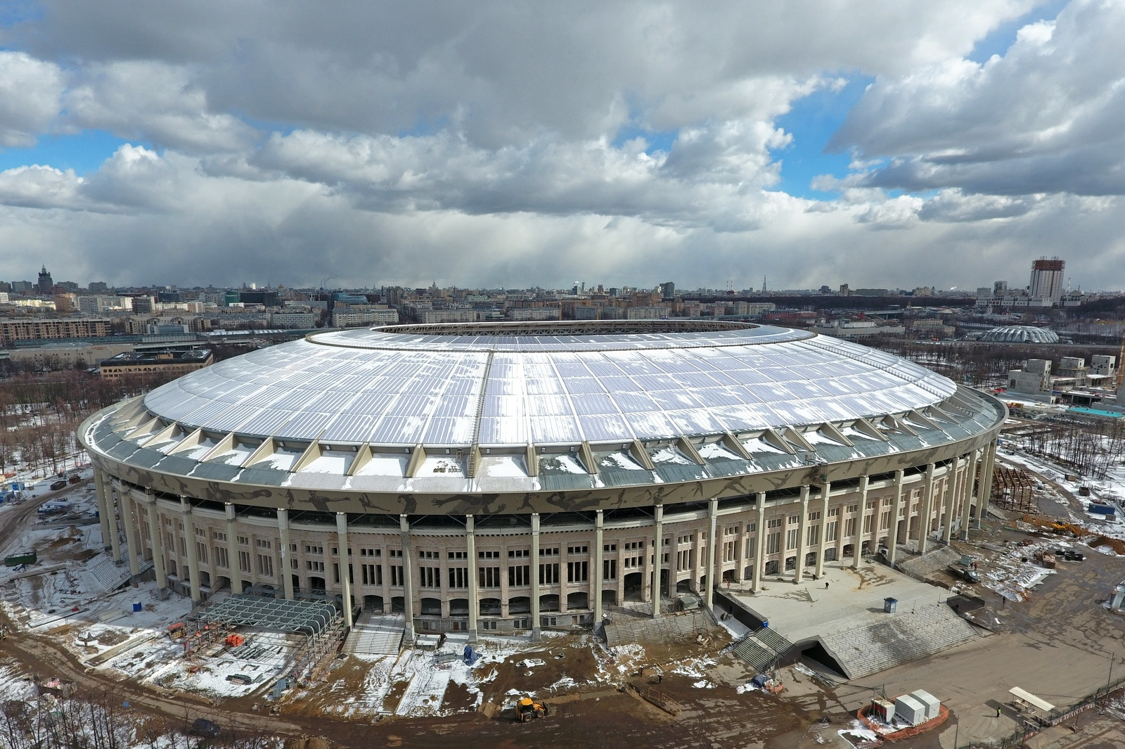 Реконструкция стадиона «Лужники» в Москве.